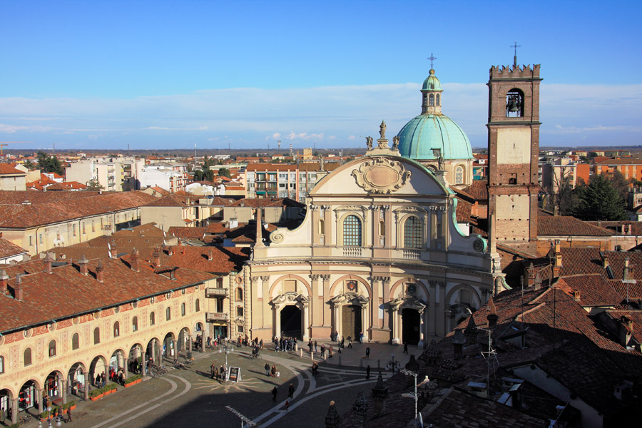 Panorama di piazza Ducale e del Duomo di Vigevano (PV) dalla Torre del Bramante.